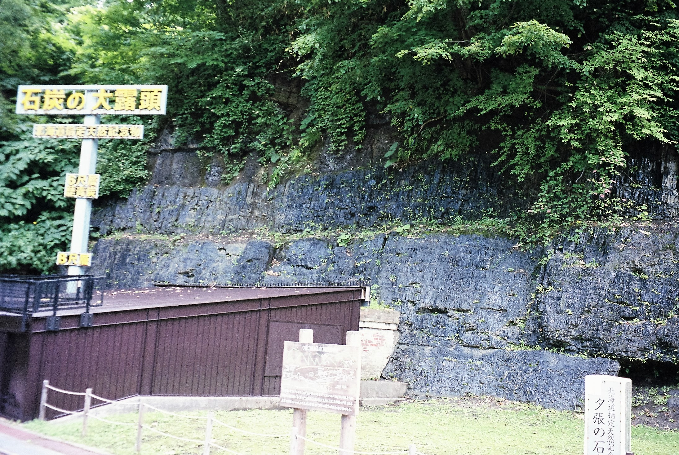 石炭の大露頭（夕張市石炭博物館）